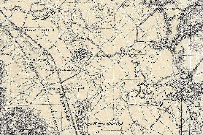 Sajóecseg és környéke, III. katonai felmérés, 4765/2 szelvény, részlet